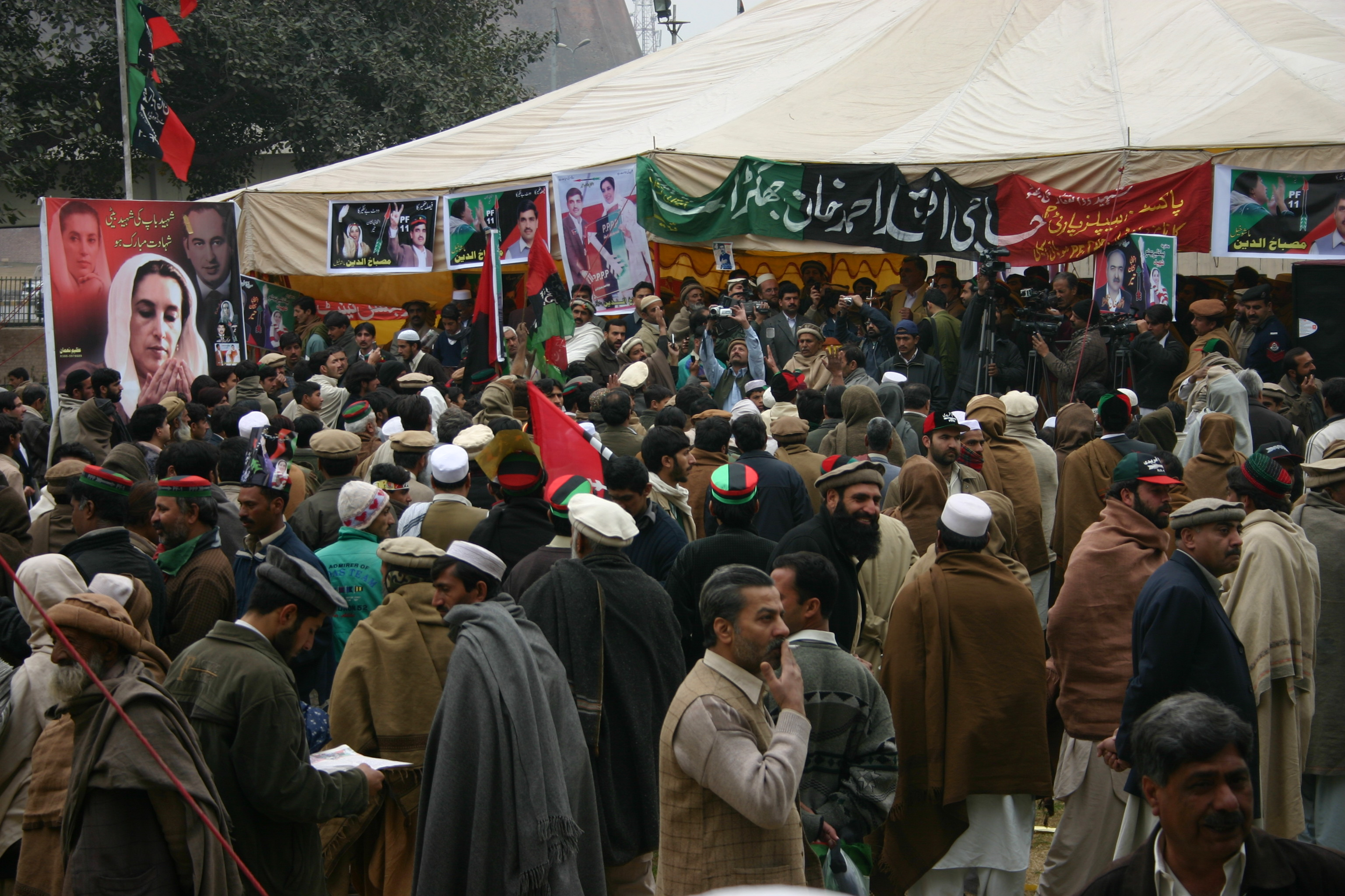 PPP Wahlveranstaltung in Peshawar